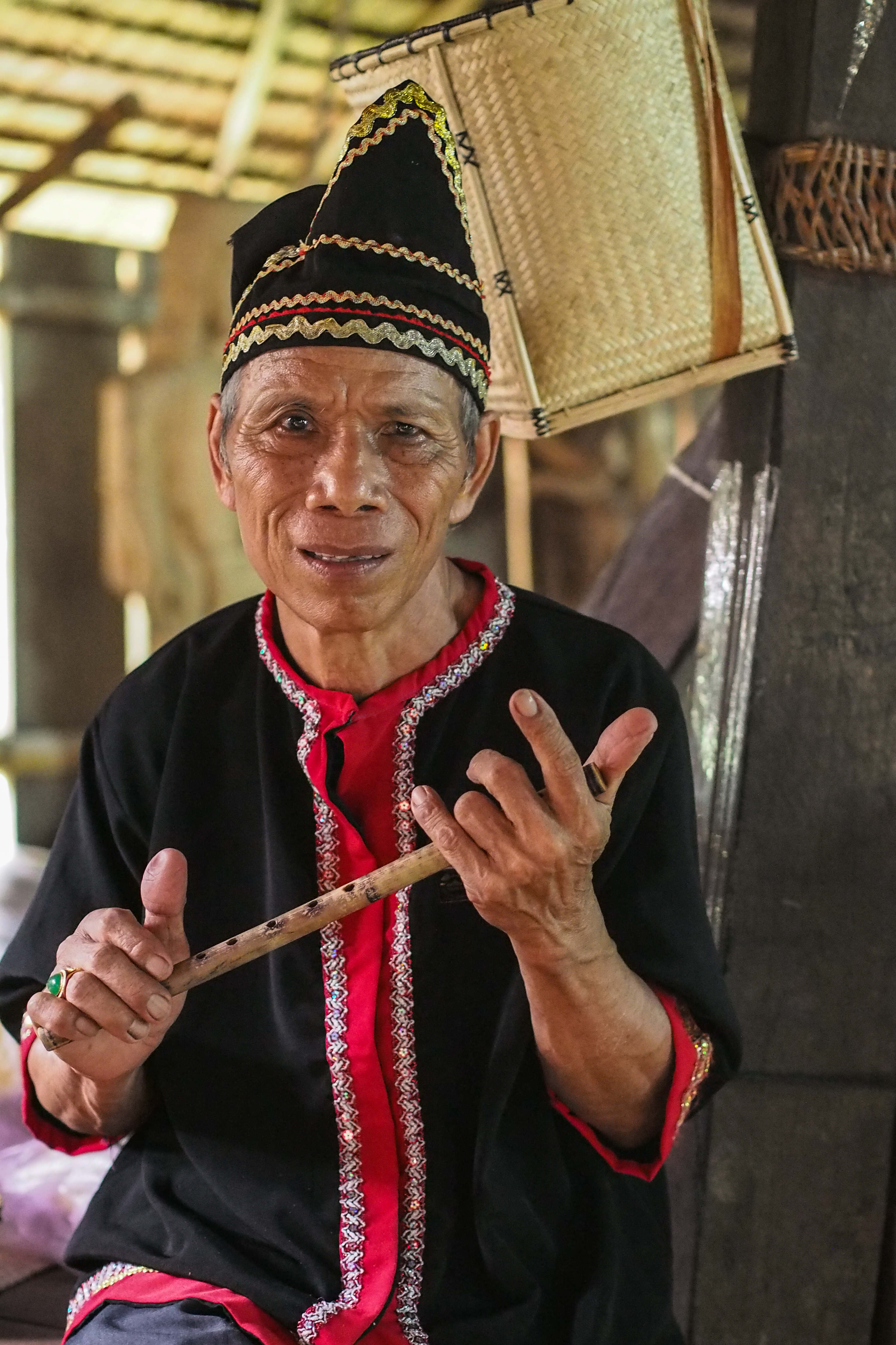 bidayuh sarawak